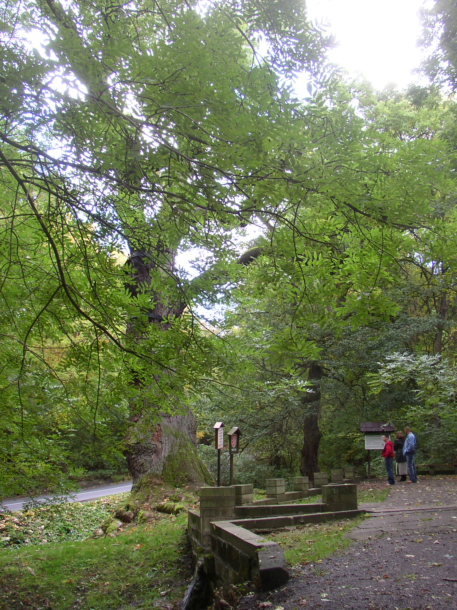 1000 let starý Oldřichův dub v Peruci, okres Louny; vyfotografoval Miaow Miaow v říjnu 2004.